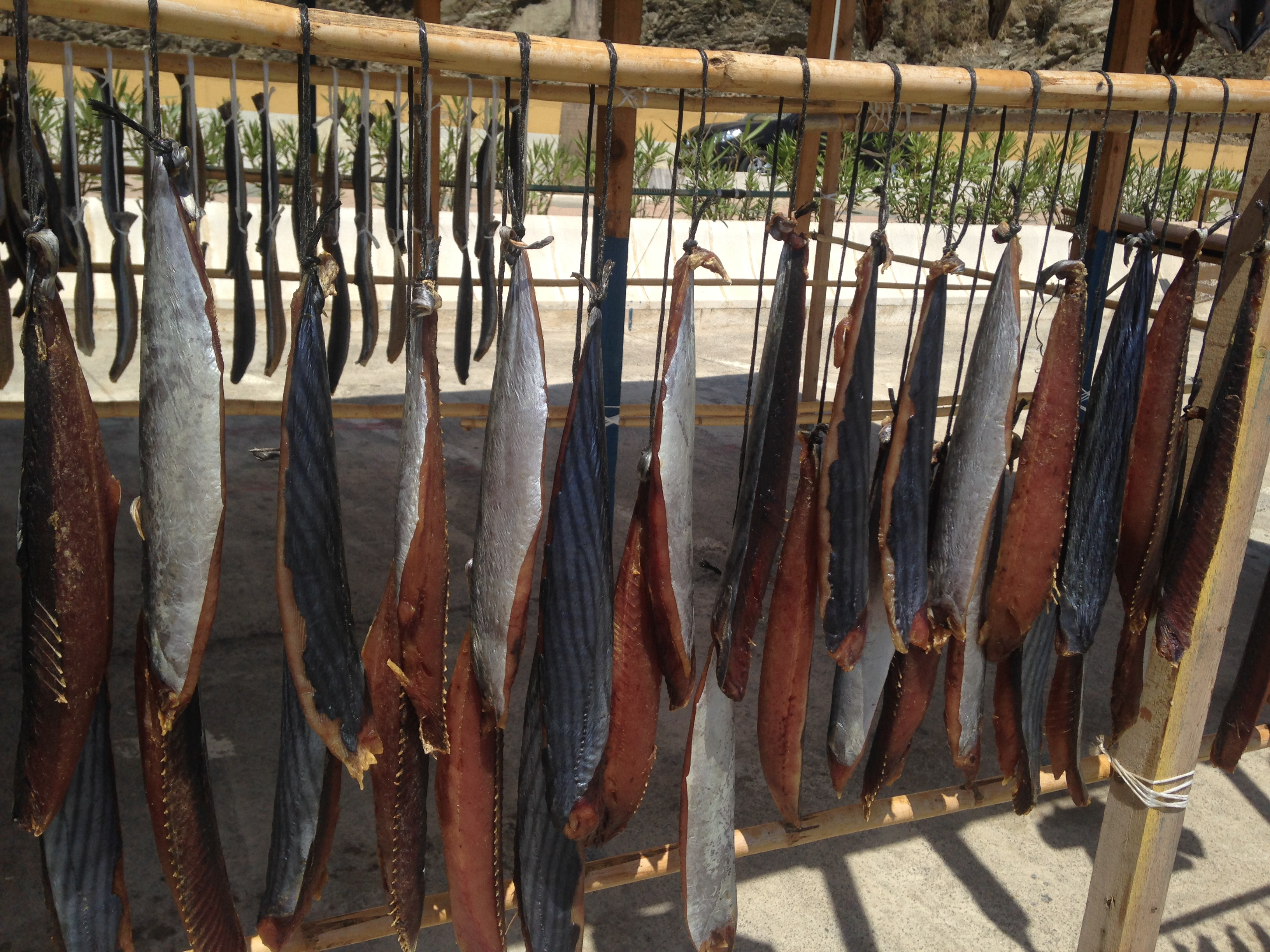 Lomos de bonito en el secadero de la playa del Chorrillo en Ceuta